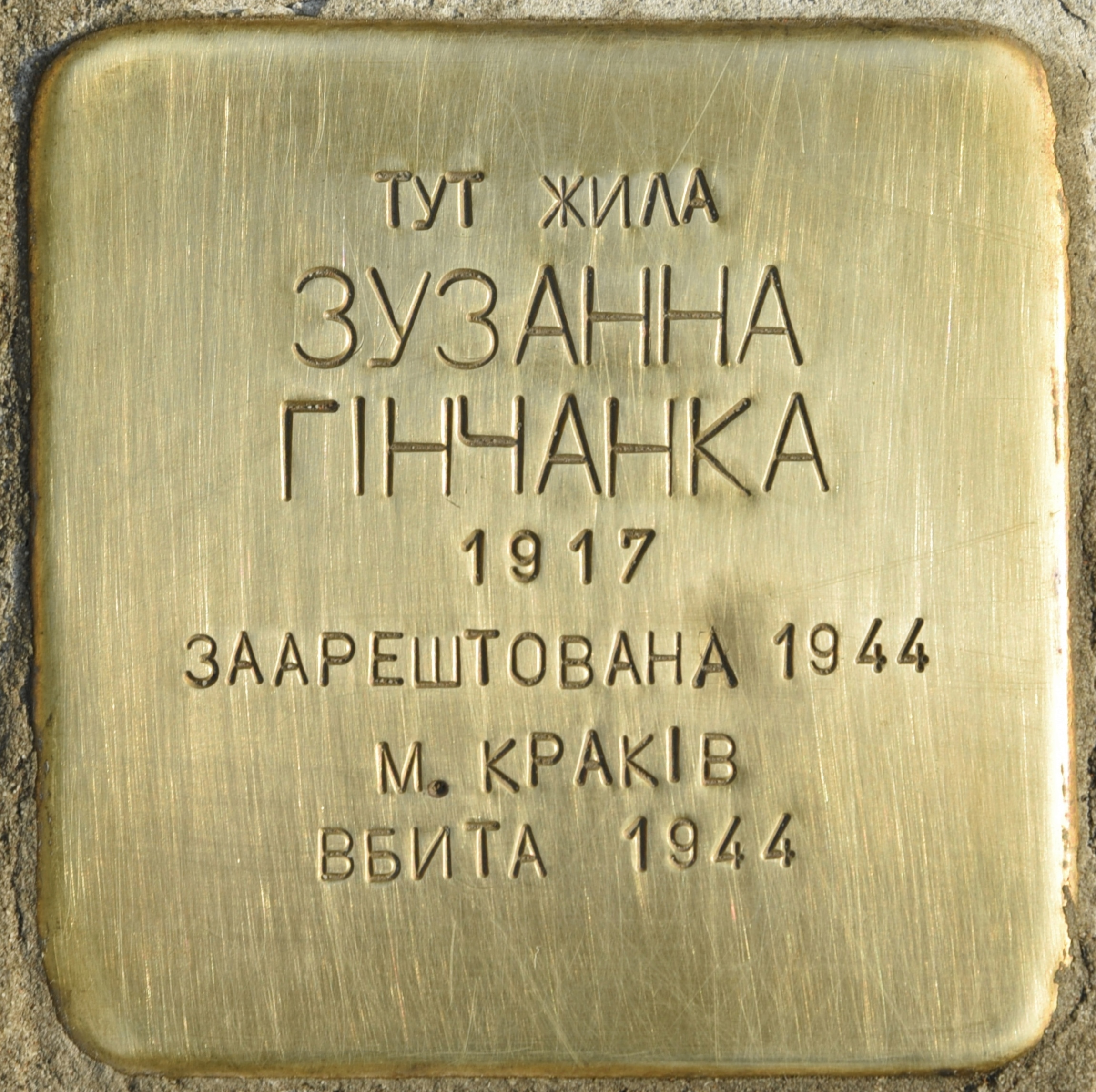 Stolperstein für Zuzanna Hinchantsa (Зузаннa Гінчанцa)